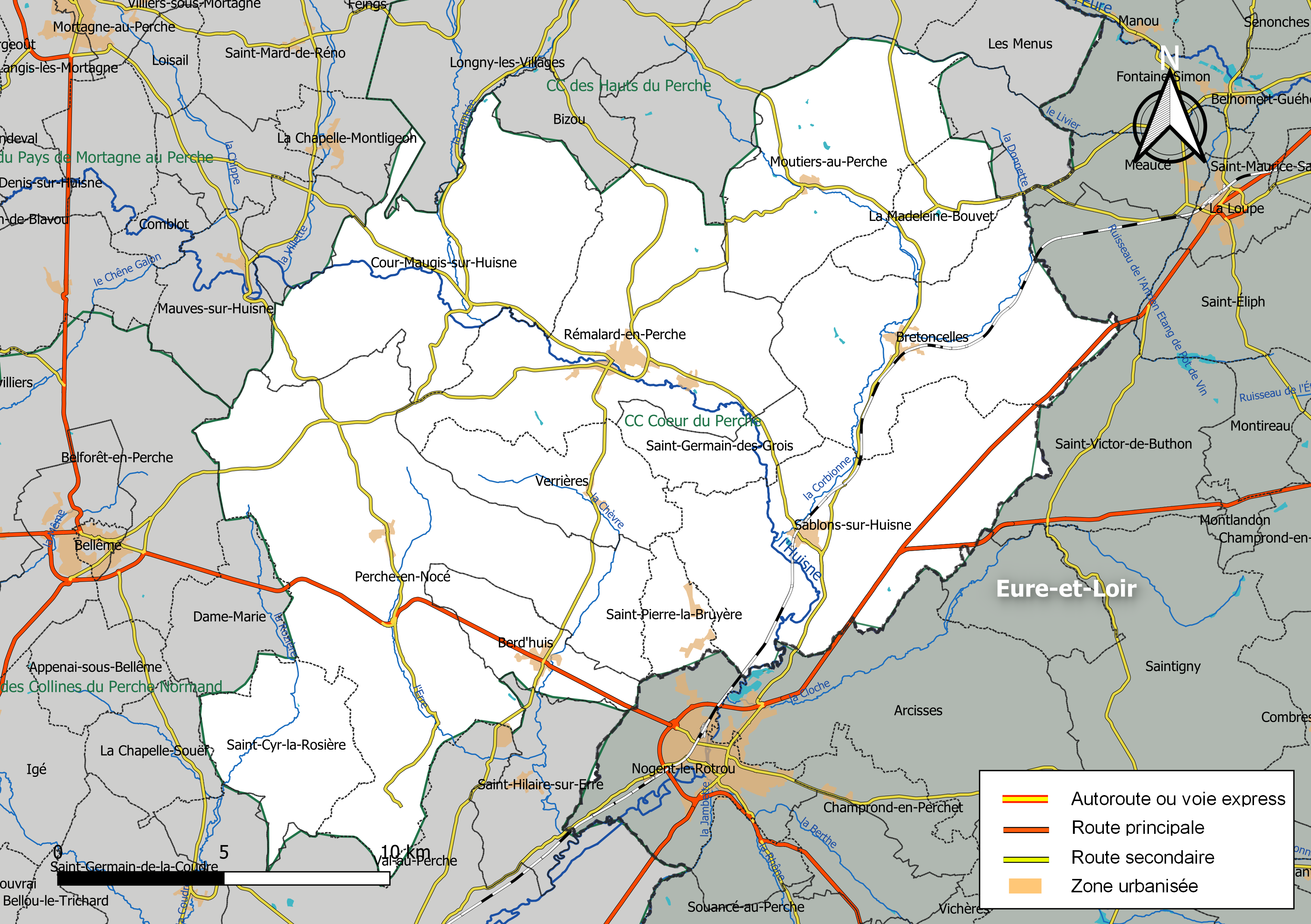 Carte géographique de la Communauté de communes Cœur du Perche, département de l'Orne, France. Composition au 1er janvier 2019.